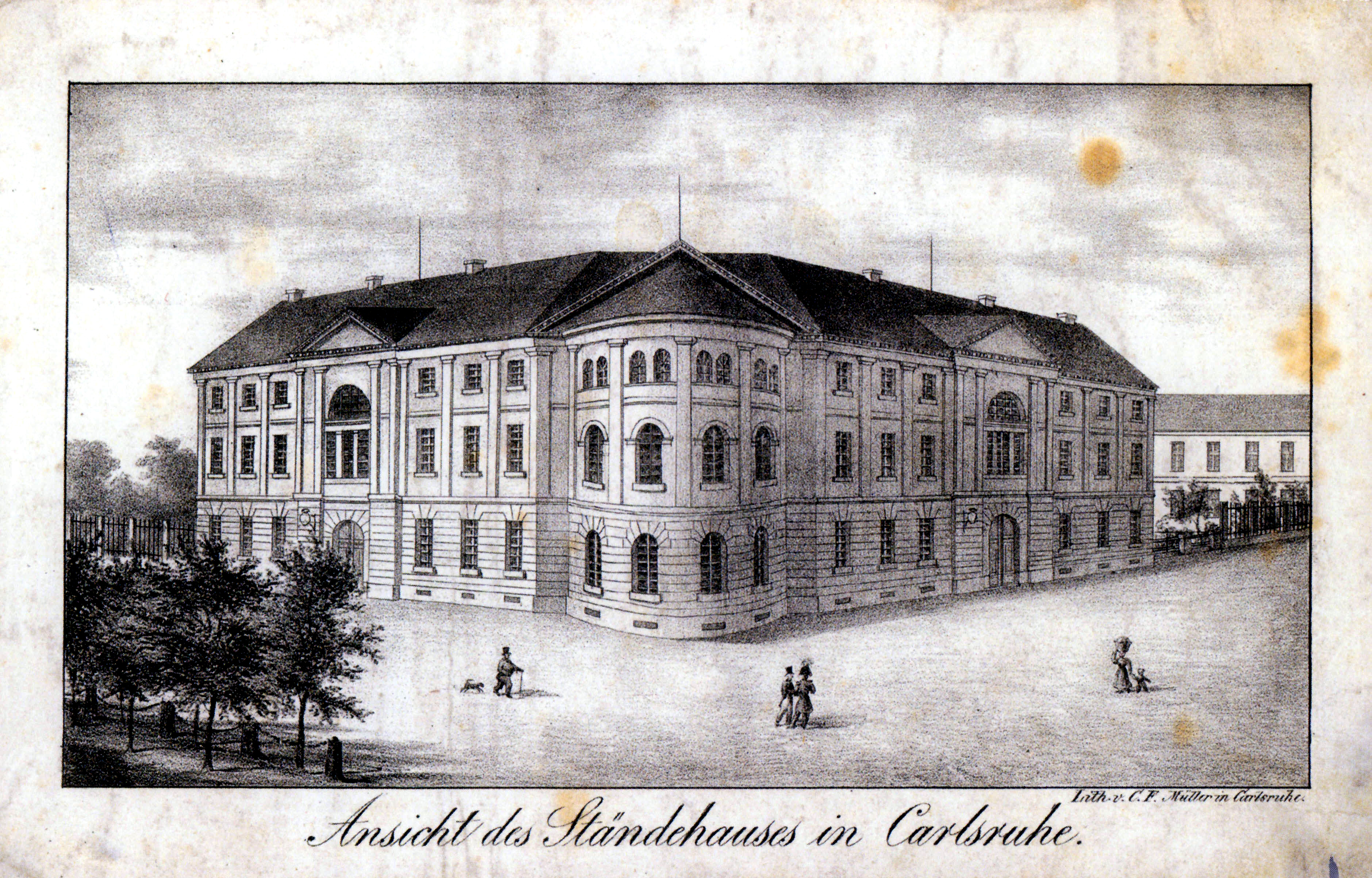 Ansicht des Ständehauses in Carlsruhe (der badische Landtag), nach 1822 (GLAK J-B Karlsruhe Nr. 112)